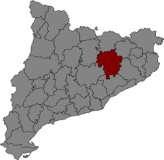 Localització d'Osona